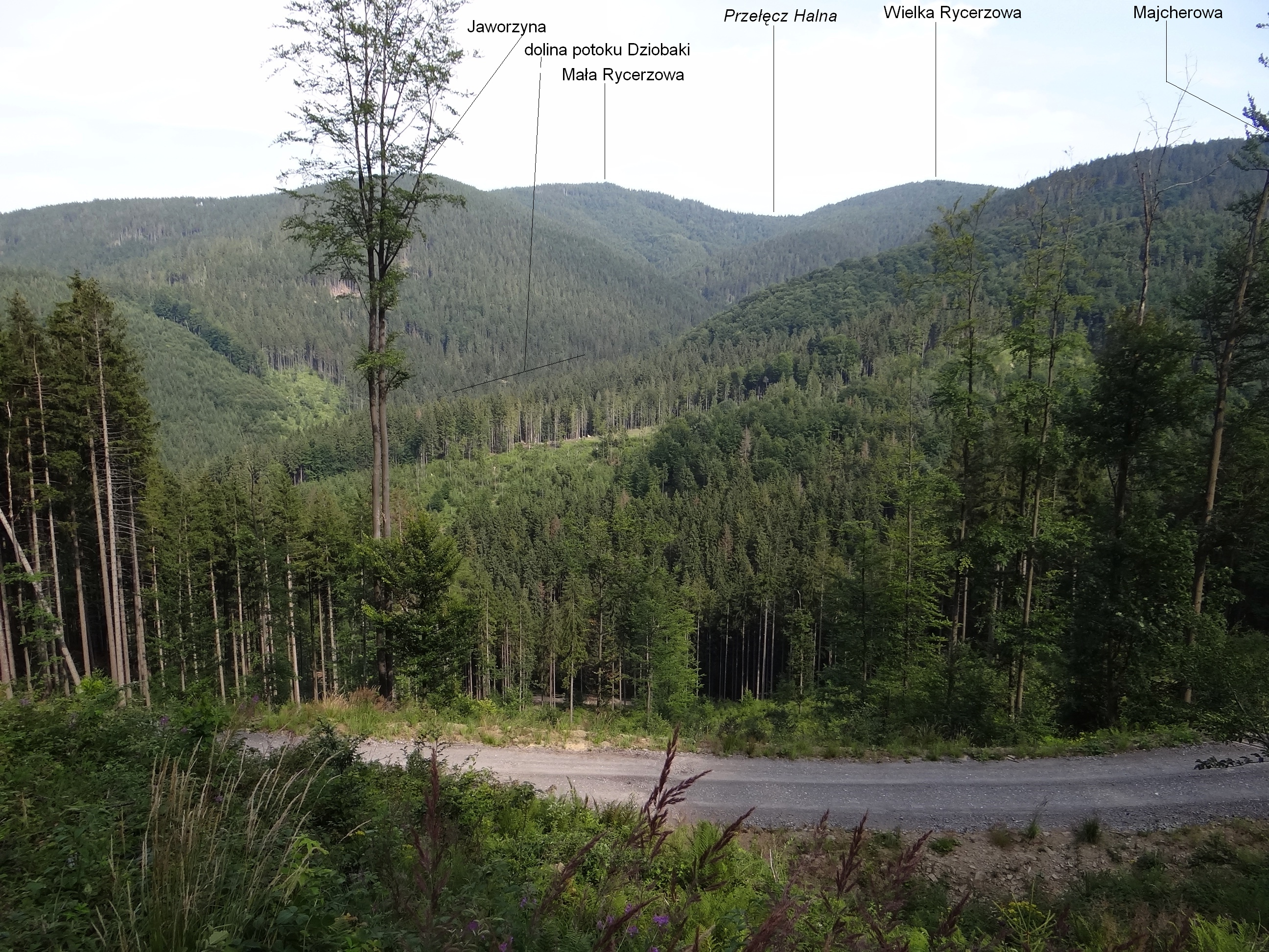 Widok z zielonego szlaku Przełęcz Przegibek - Rycerka Dolna